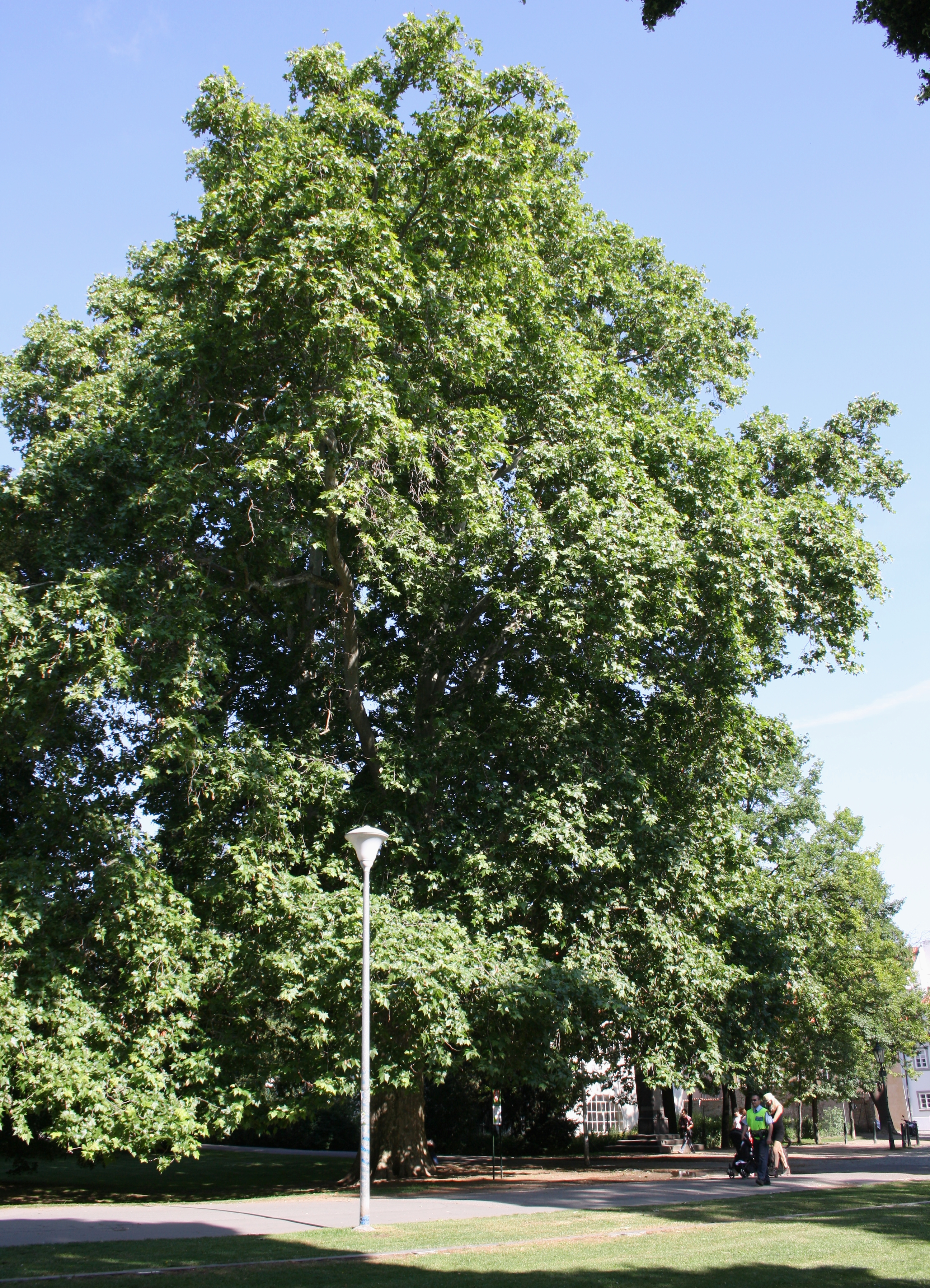 Památný platan javorolistý v parku na Kampě v Praze na Malé Straně